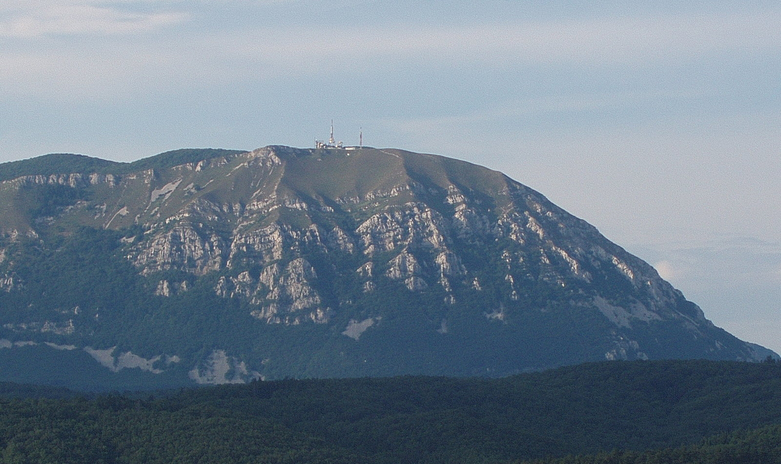 Nanos, Slovenia